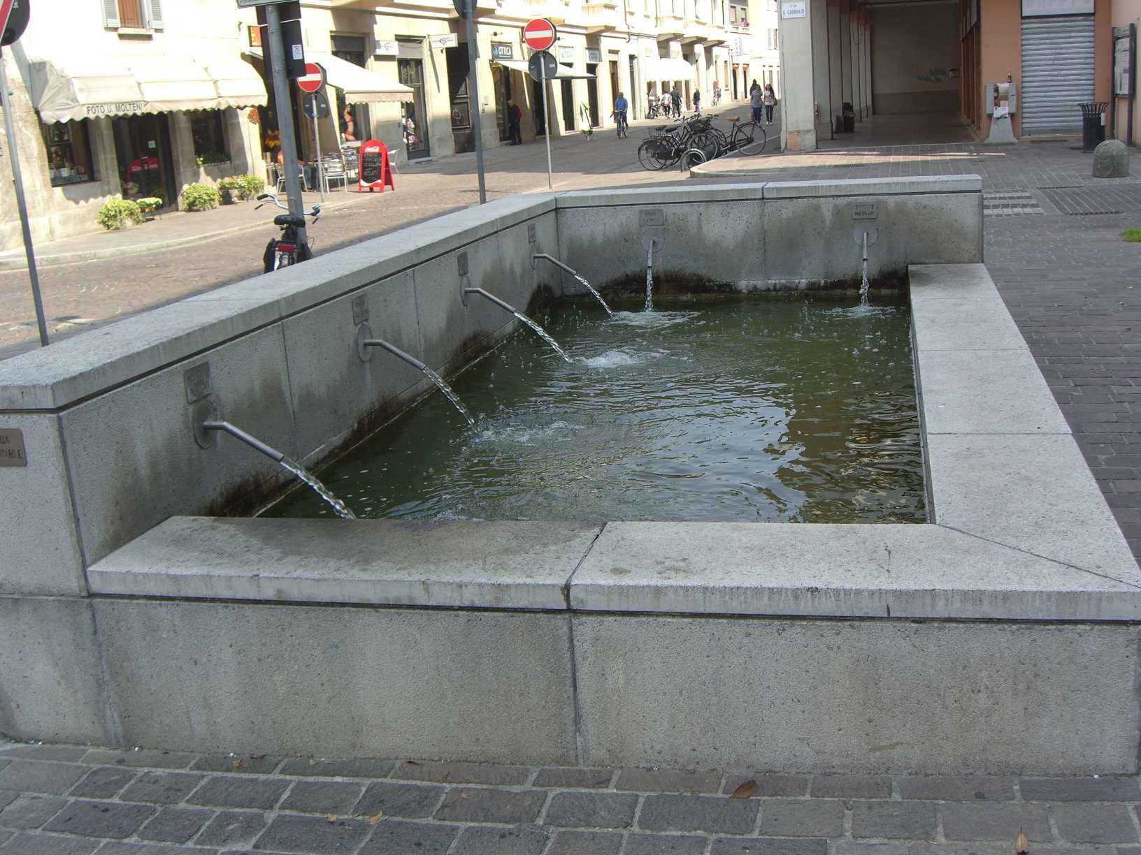 MB Villasanta la fontana dei sei corsi d'acqua in piazza Ammiraglio Camperio